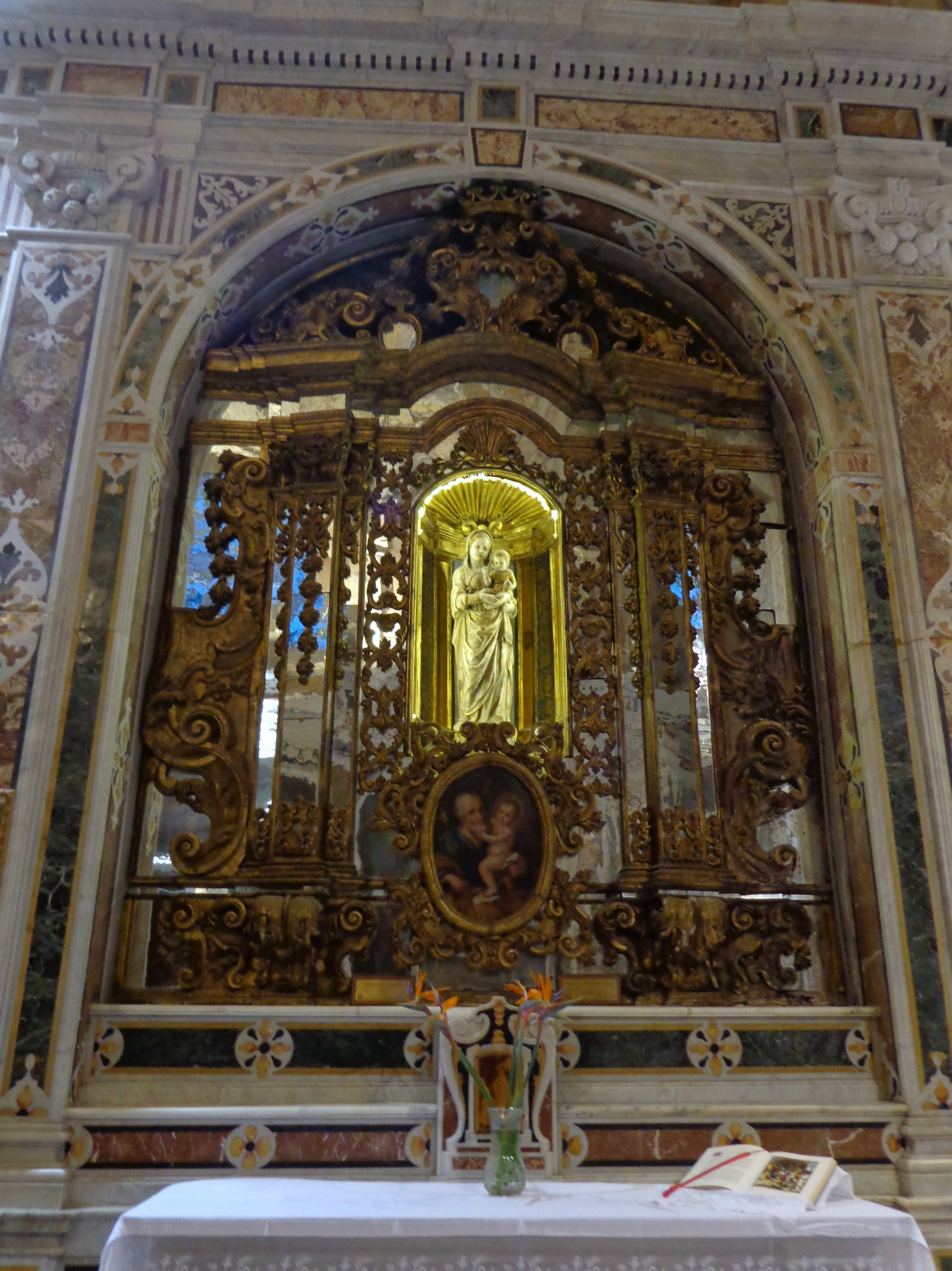 Madonna con Bambino Gagini Milazzo Altare